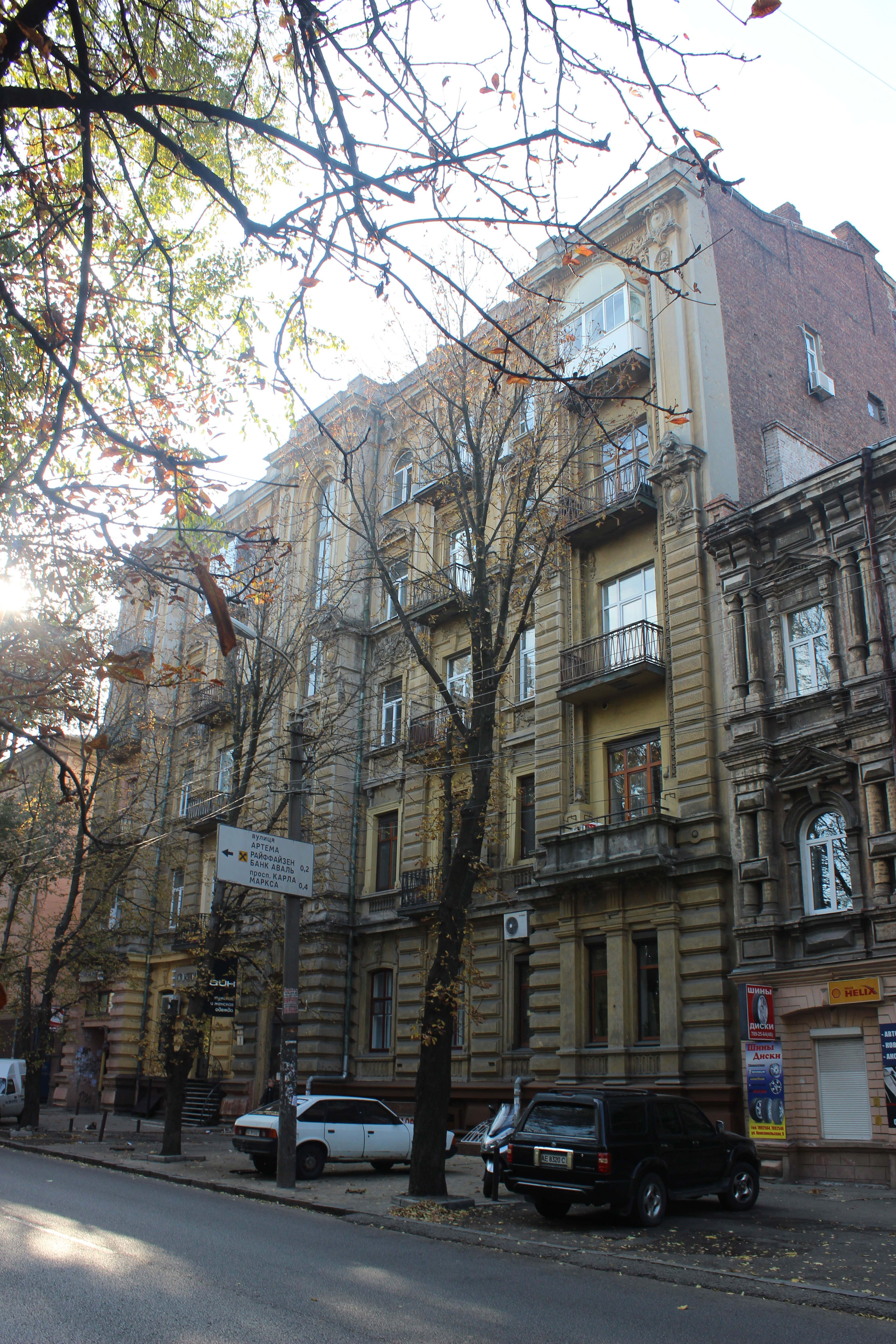 Доходний будинок, Дніпро, вул. Старокозацька, 7